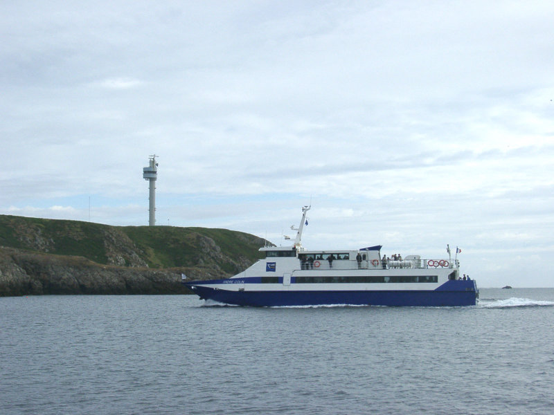 DescriptionSémaphore de l'ile de Ouessant Lieu : Ouessant, Bretagne, France Date : 2001 Auteur : Pline photo personnelle